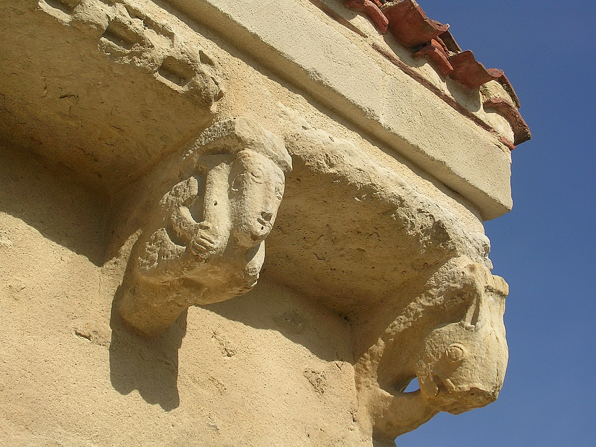 Modillons de l'église sainte Marie de Bostens, Landes, France